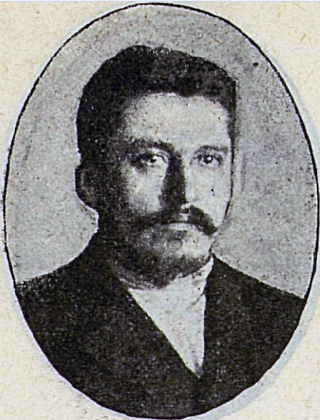 Александр Николаевич Растворов (19 октября 1871, Оренбургская губерния — после 1907) — волостной писарь, депутат II Государственной думы Российской империи от Оренбургской губернии (1907).